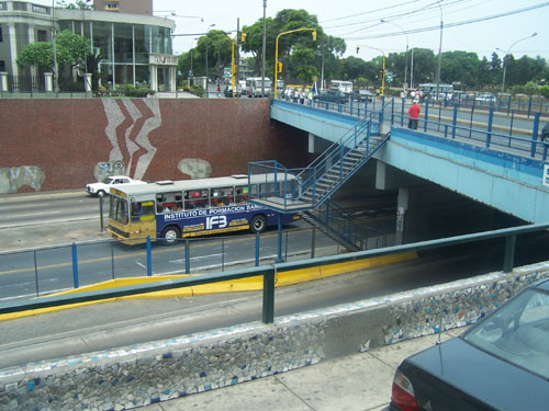 ParaderoEnatru